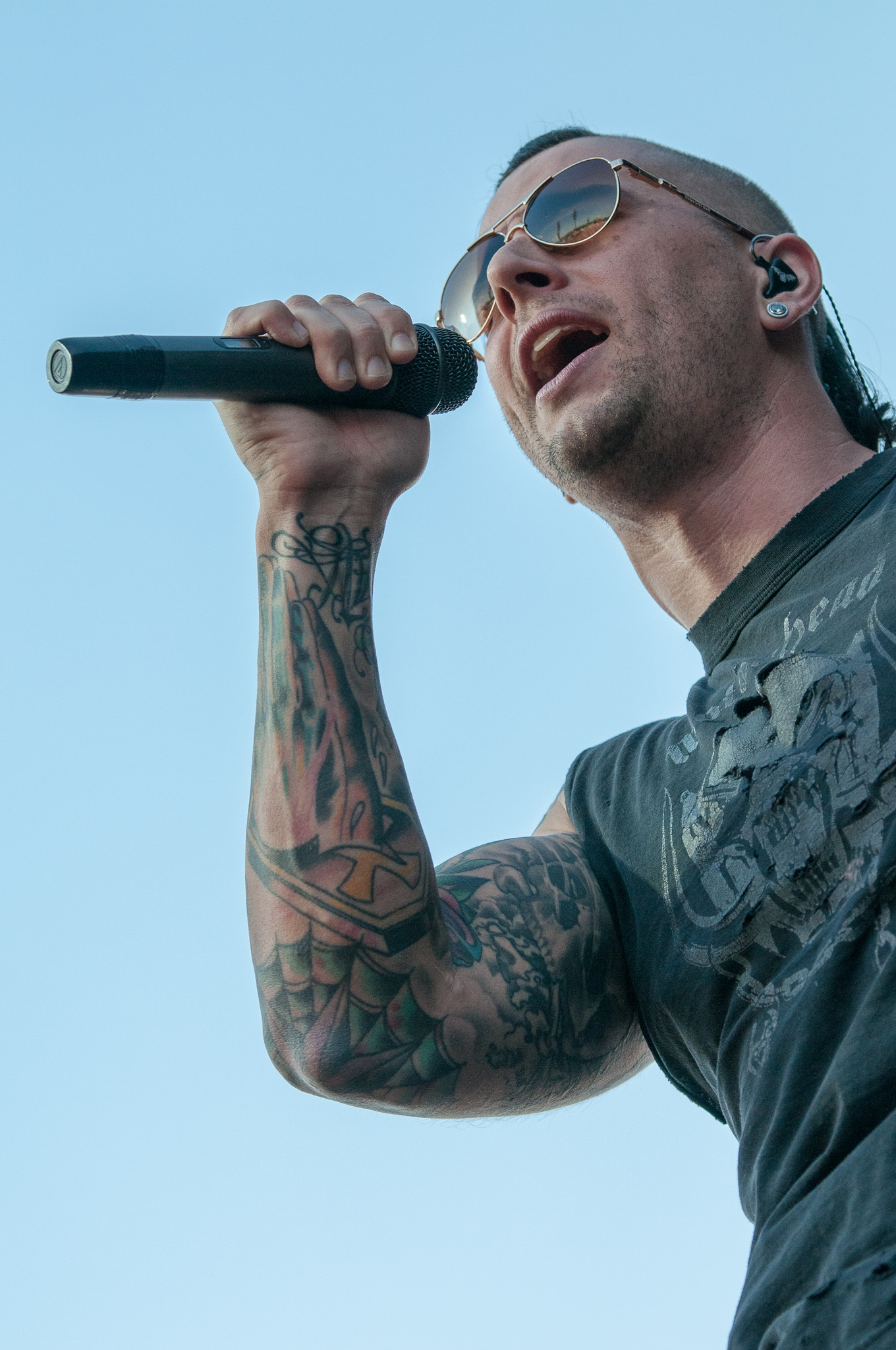 ARGO-Konzerte,Avenged Sevenfold,Konzert,Livekonzert,Livemusik,M. Shadows,Matthew Charles Sanders,Musik,RiP,Rock im Park 2014